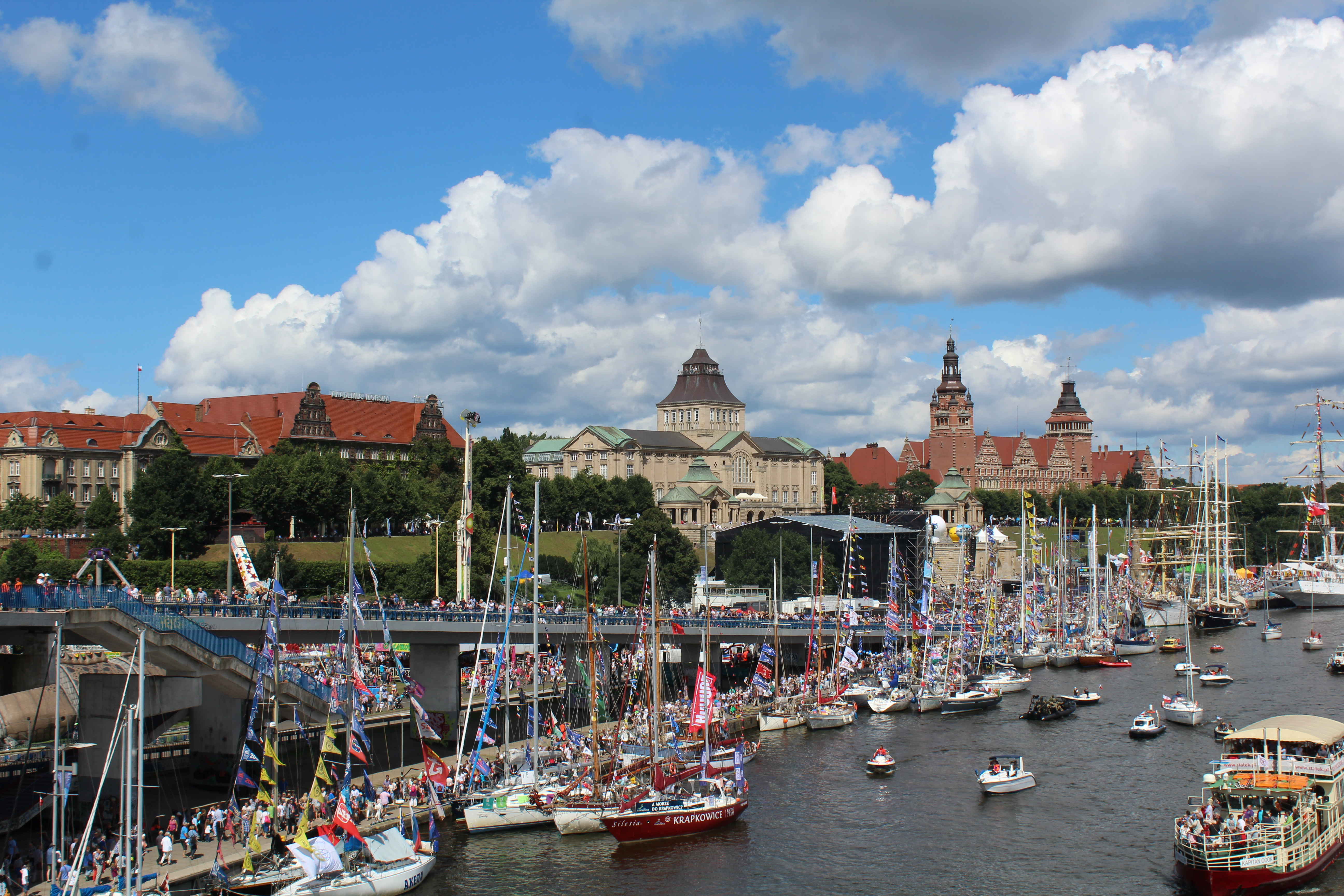 The Tall Ships’ Races 2017, Wały Chrobrego, Szczecin